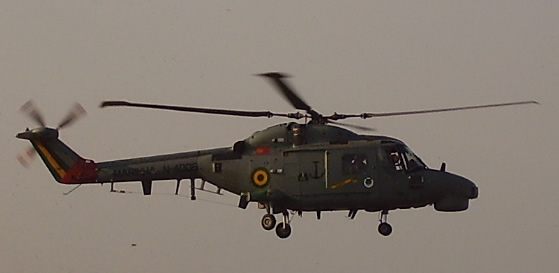 Super Linx da Marinha do Brasil